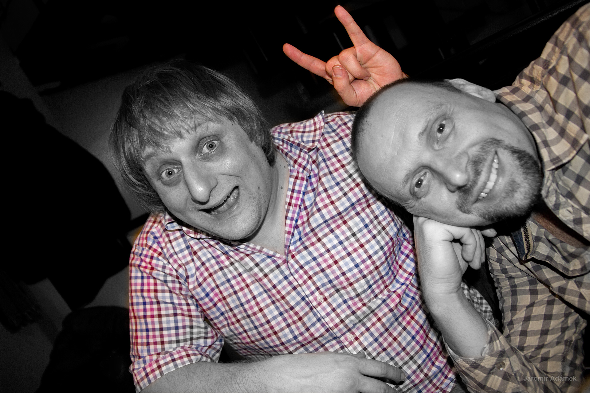 vystoupení Lukáše Pavláska (vlevo) a Miloše Knora (vpravo) v třineckém kině Kosmos.